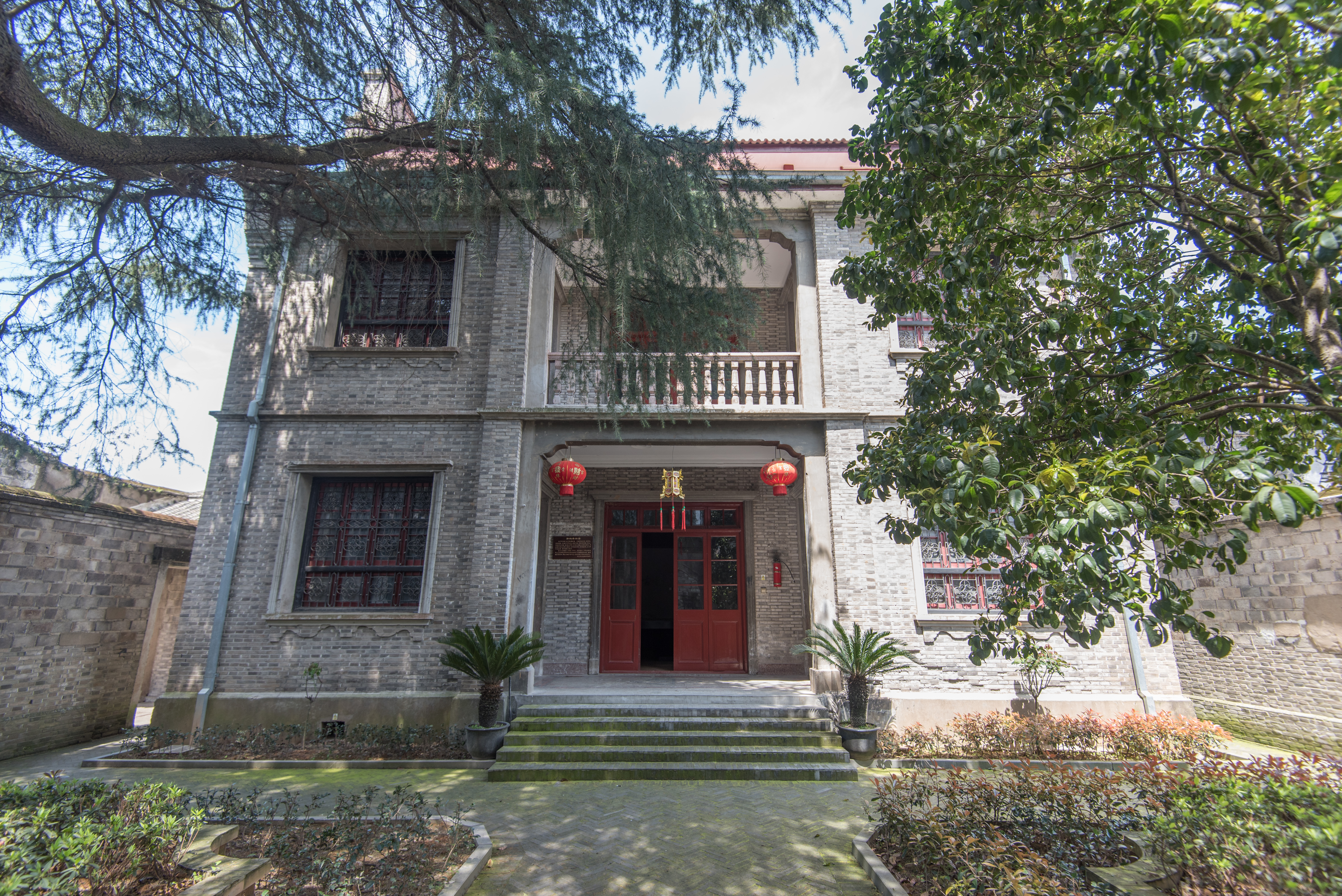 青云孙鹤皋故居